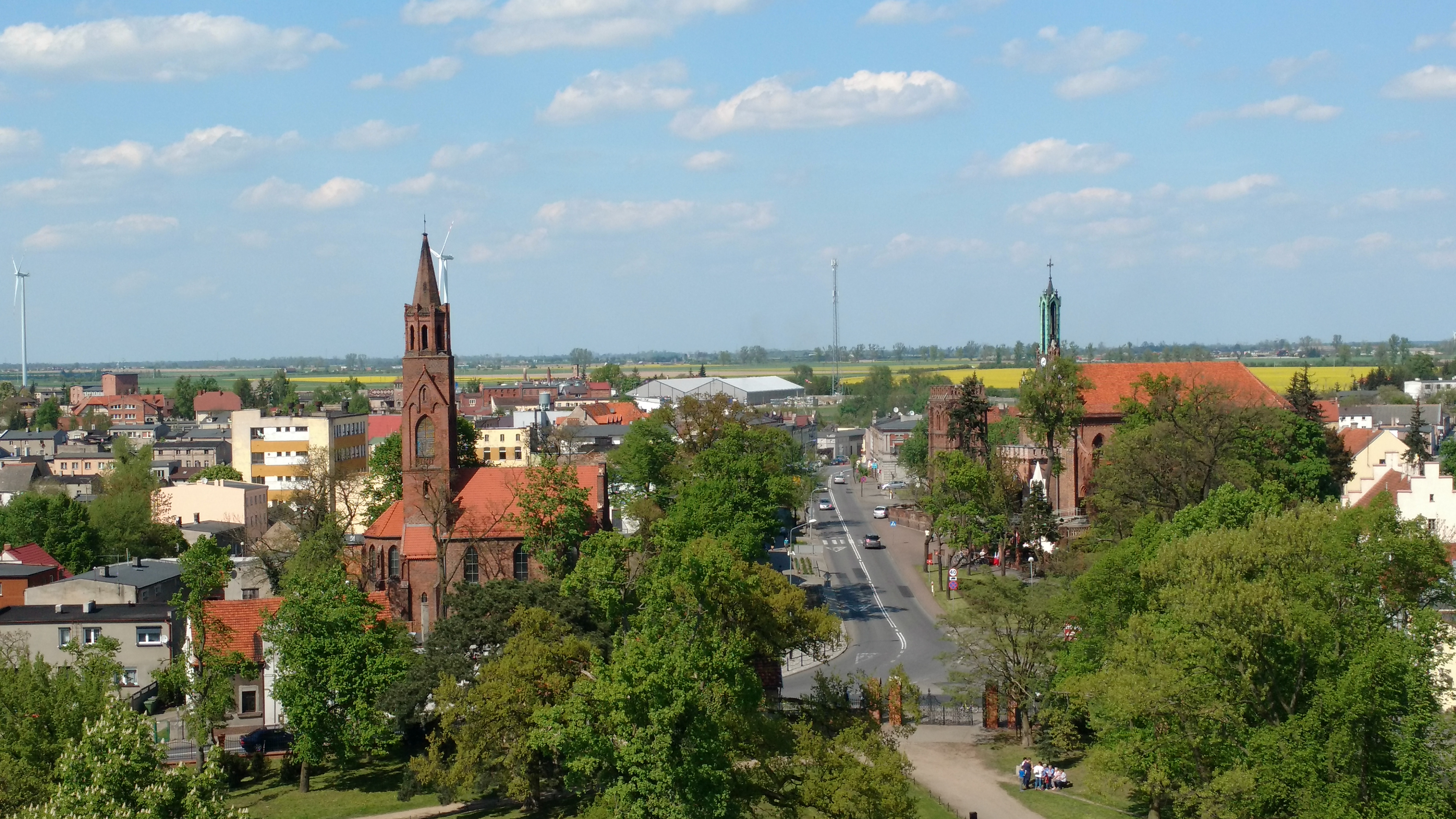 Miłosław - panorama